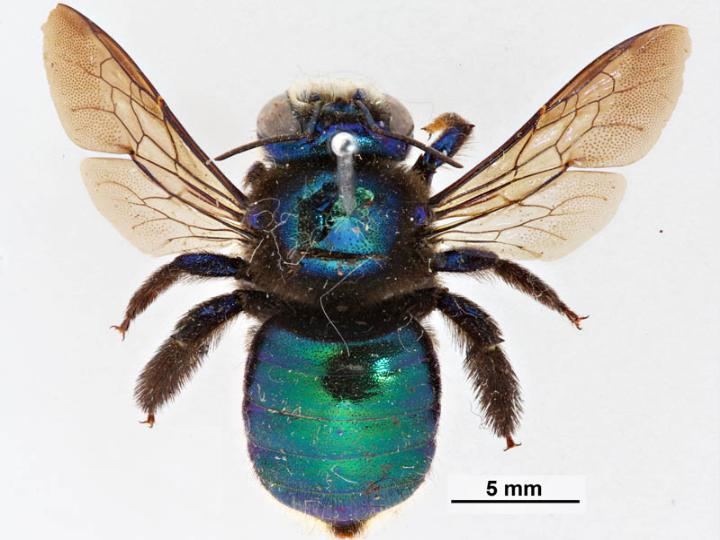 Xylocopa bombylans female